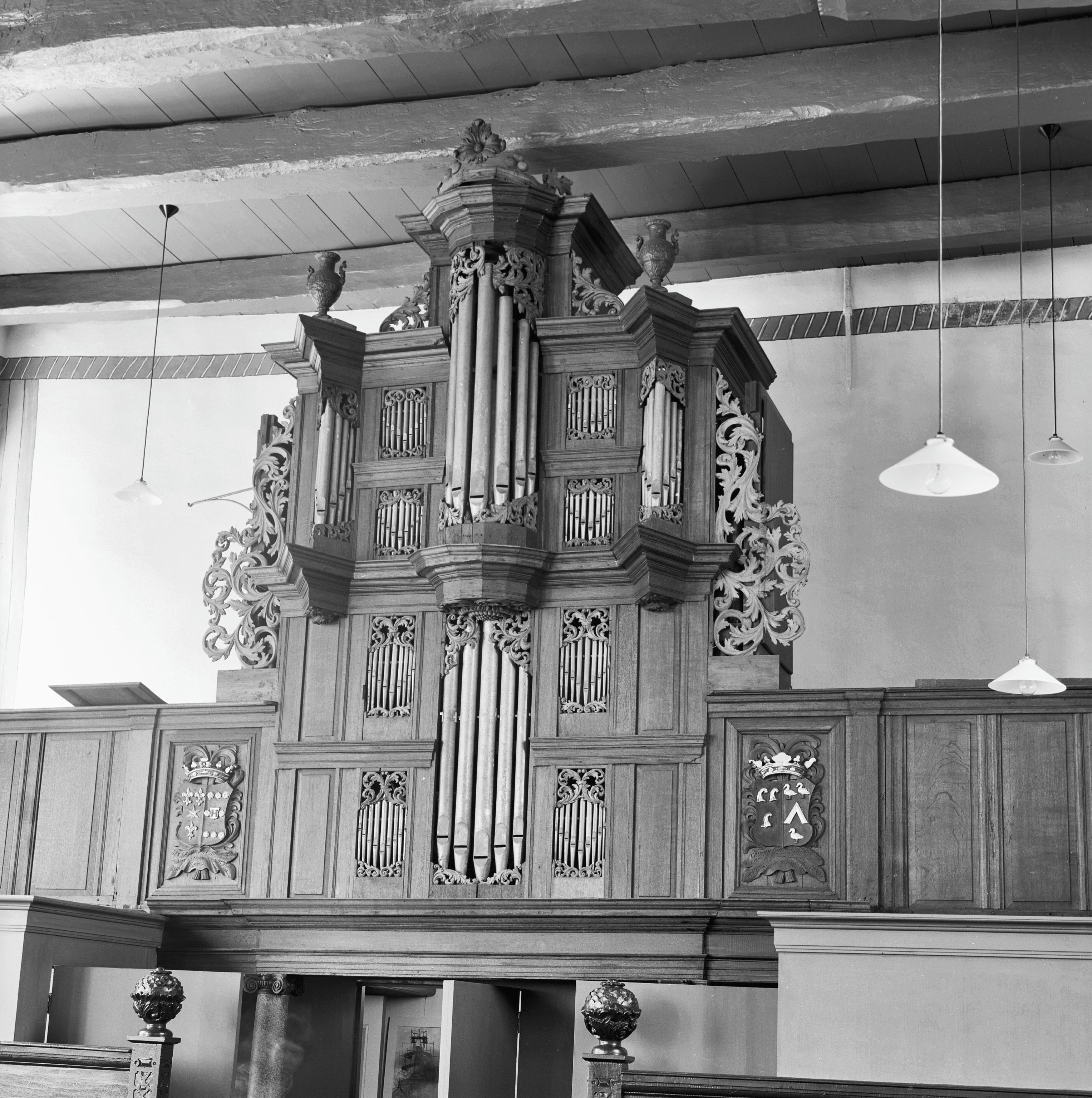 Nederlands Hervormde Kerk: orgel